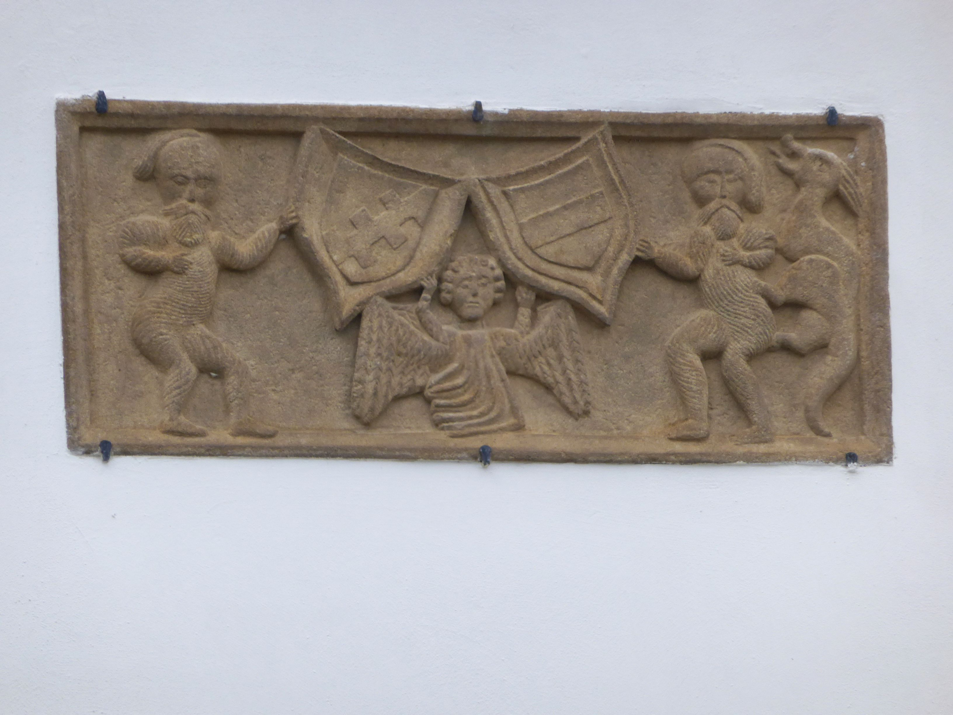 Schloss Aholming, Wappenstein mit Allianzwappen Graf Georg Heinrich VI. Notthafft und Margaretha, geb. von Ortenburg (Ehefrau hier heraldisch rechts)